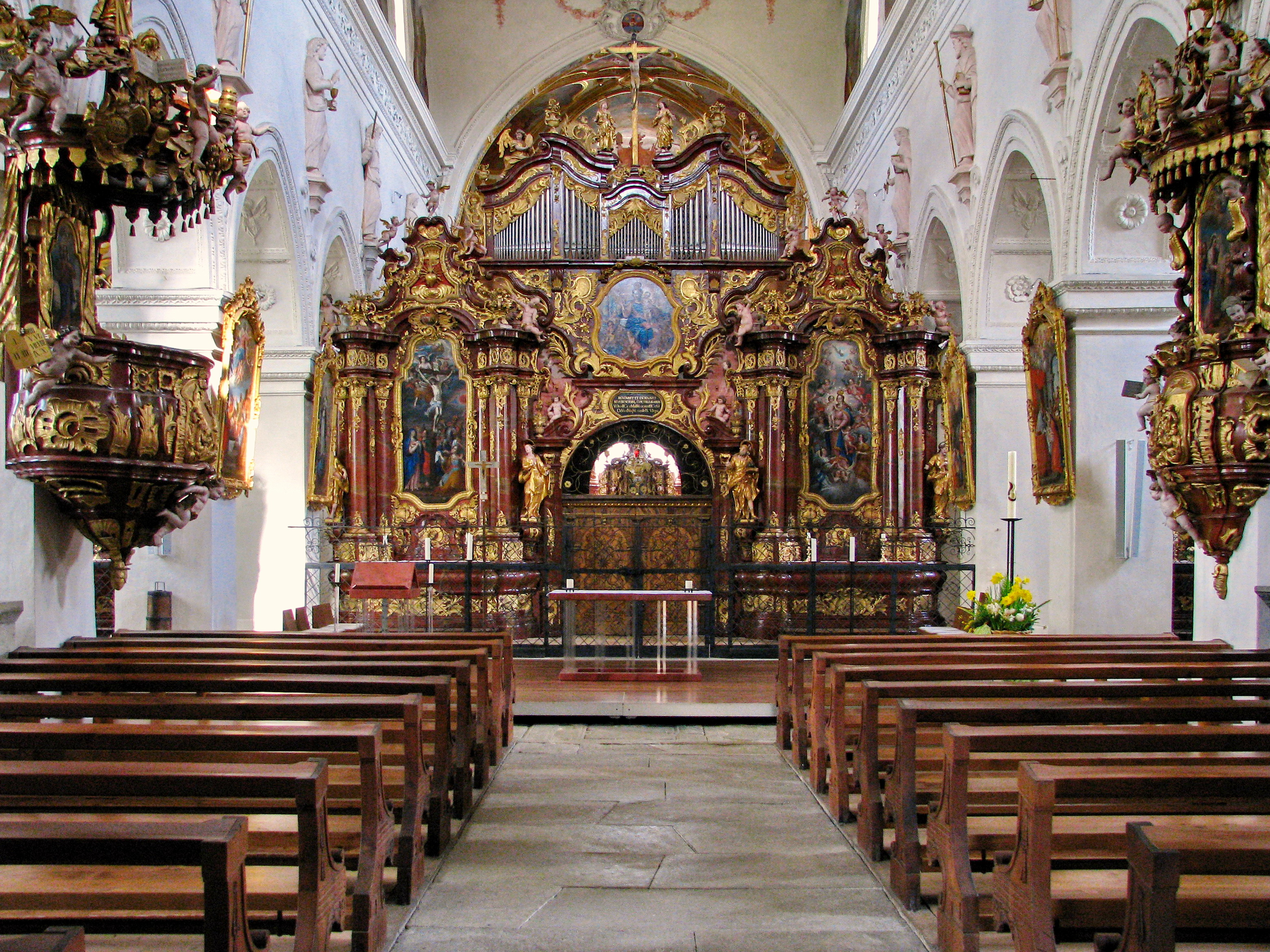 Kloster Wettingen in Wettingen